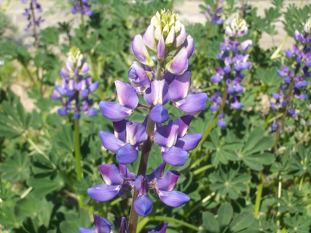 Arroyo Lupine - Lupinus succulentus Rancho Santa Ana Botanic Garden - Claremont, CA